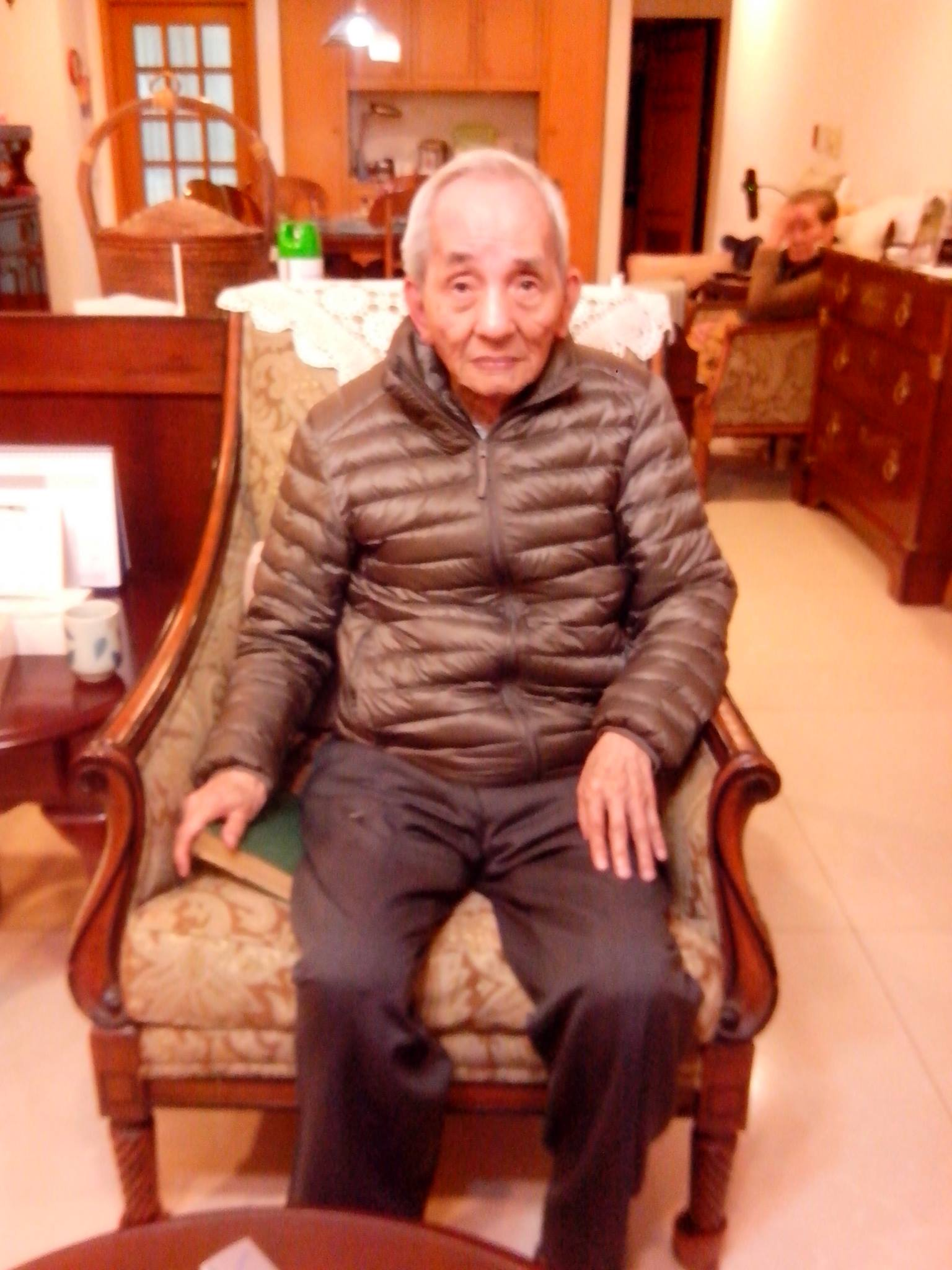 2016年的許雲基，由User:和平奮鬥救地球於許雲基家中訪問後拍攝